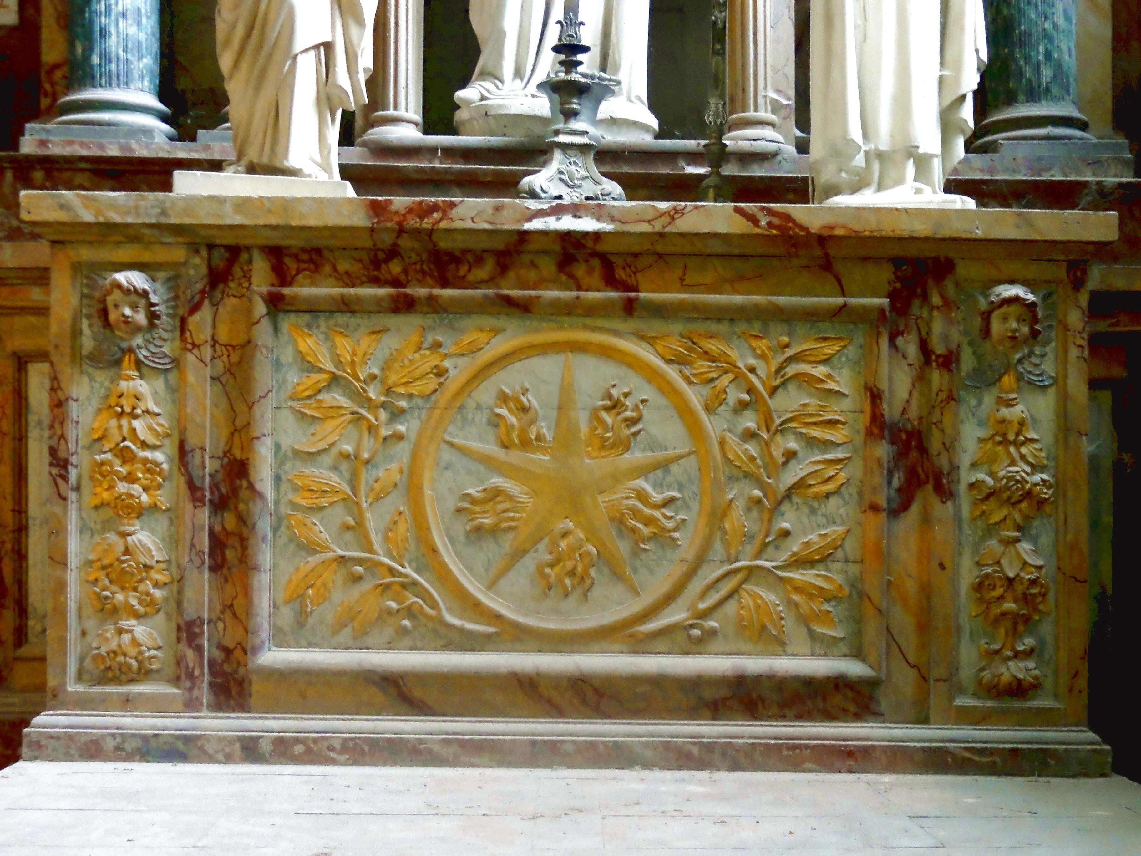 Bas-côté sud, 6e travée, autel de la Vierge.